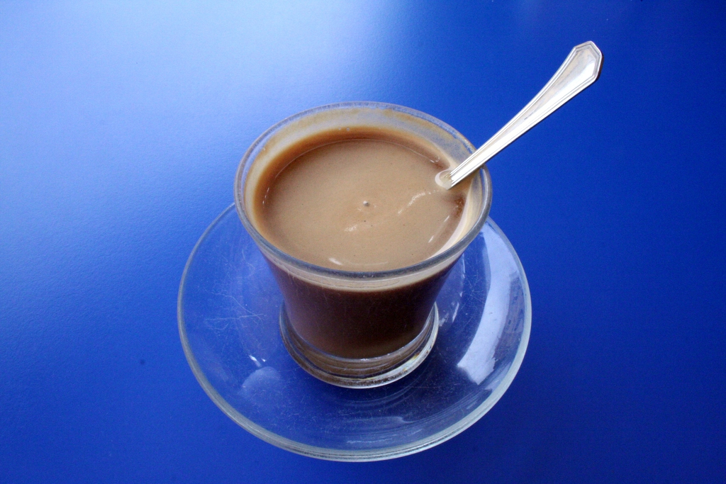 un cortado